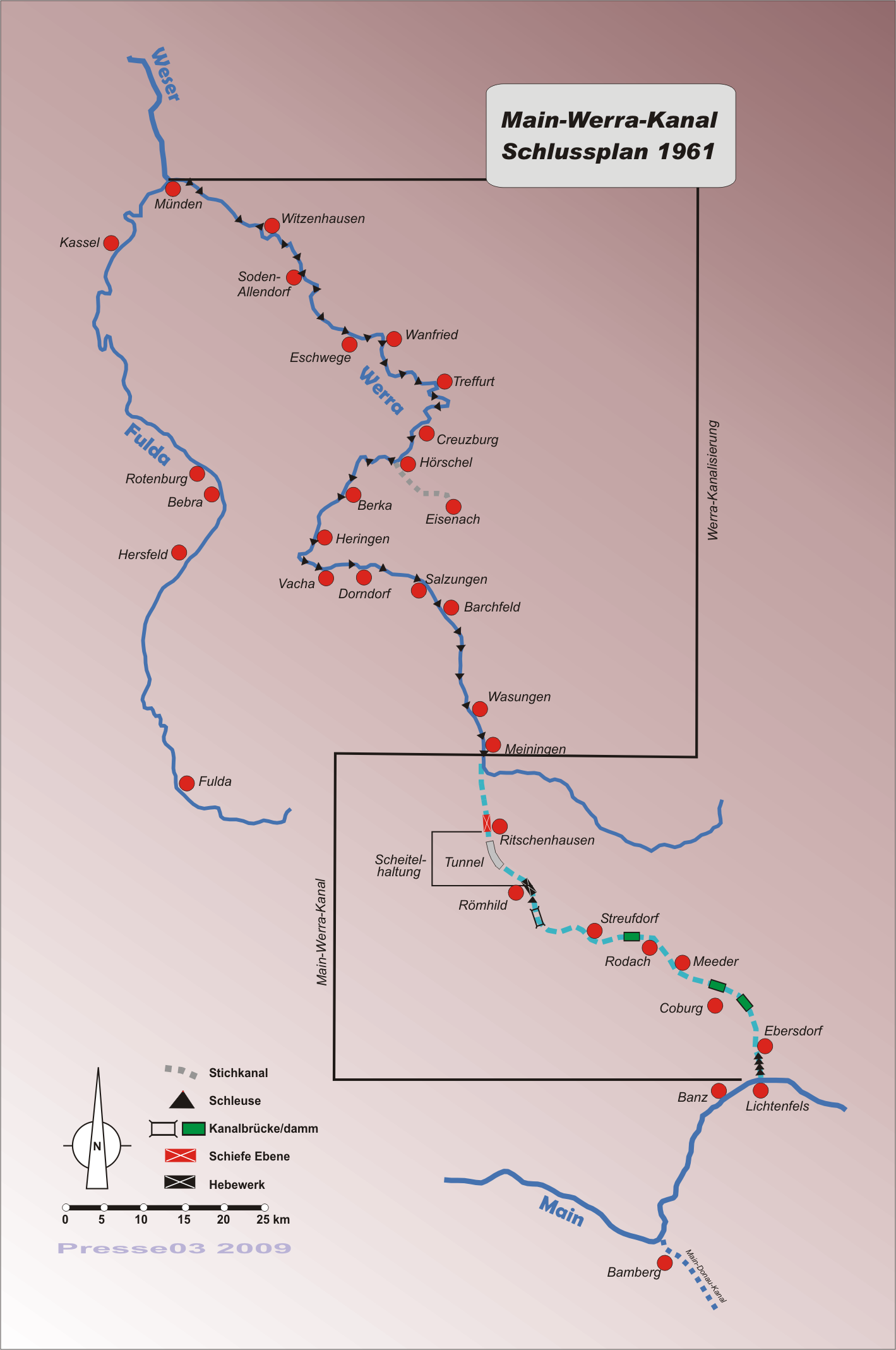 Letzter Plan ("Schlussplan") 1961 des Main-Werra-Kanals, der nie gebaut wurde.